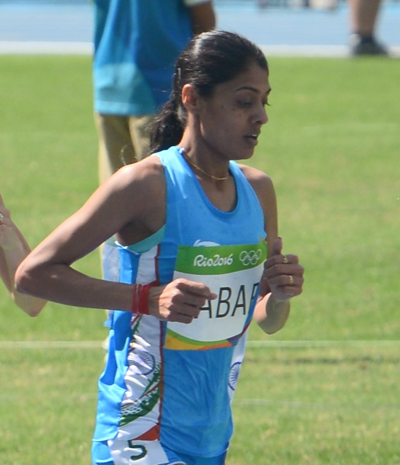 Lalita Babar au 3000m steeple des JO de Rio 2016